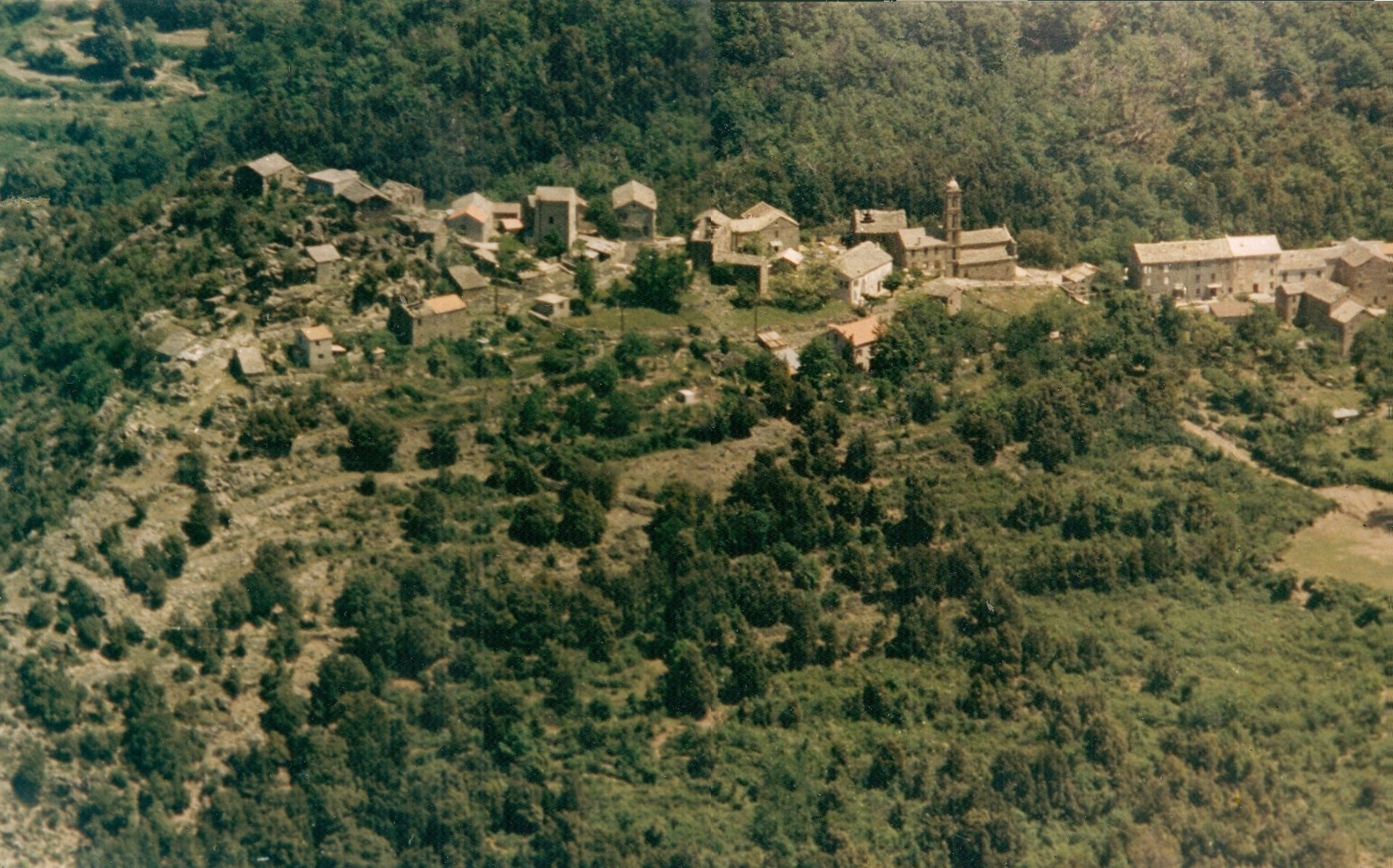 Corsu: Carticasi, Castagniccia, Corsica. U Pughjale vistu da San Cervone.